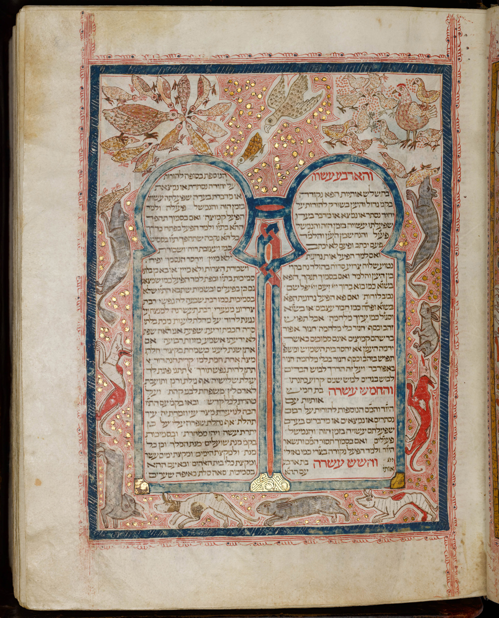 Páxina 8a da biblia Kennicott.